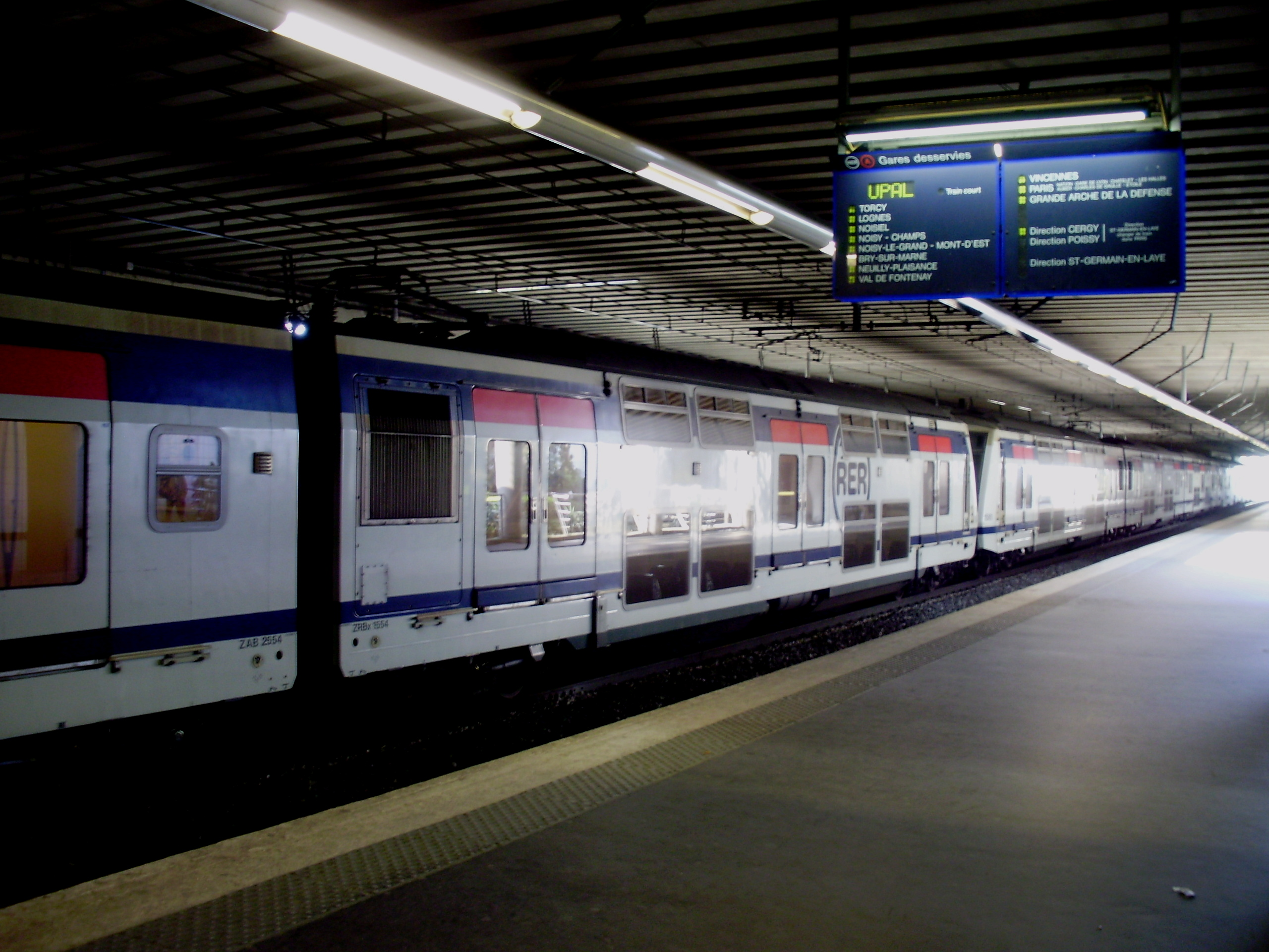 Gare de Bussy-Saint-Georges, Seine-et-Marne, France : rame de type Altéo se dirigeant vers Marne-la-Vallée - Chessy